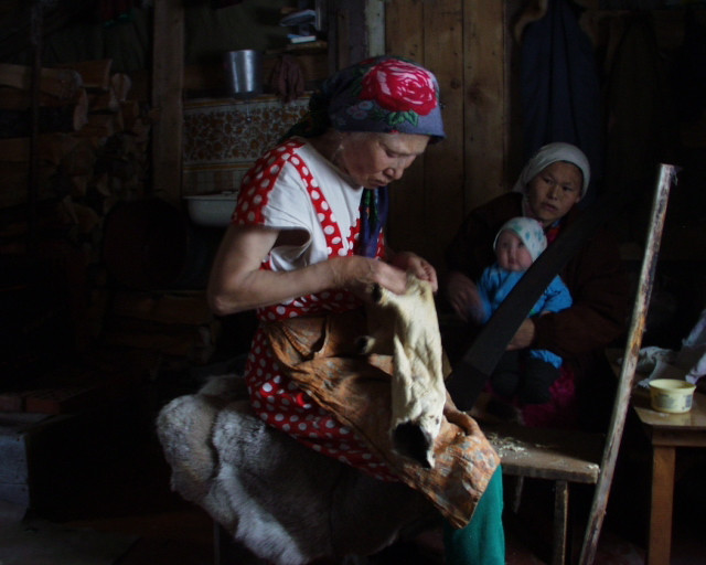 saukonnahkaa pehimitetään sormien välissä; vaaka, värillinen